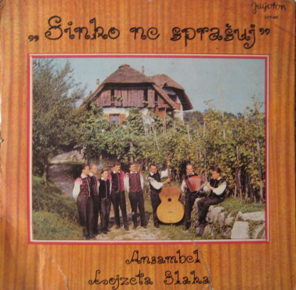 Ansambel Lojzeta Slaka - Sinko ne sprašuj.